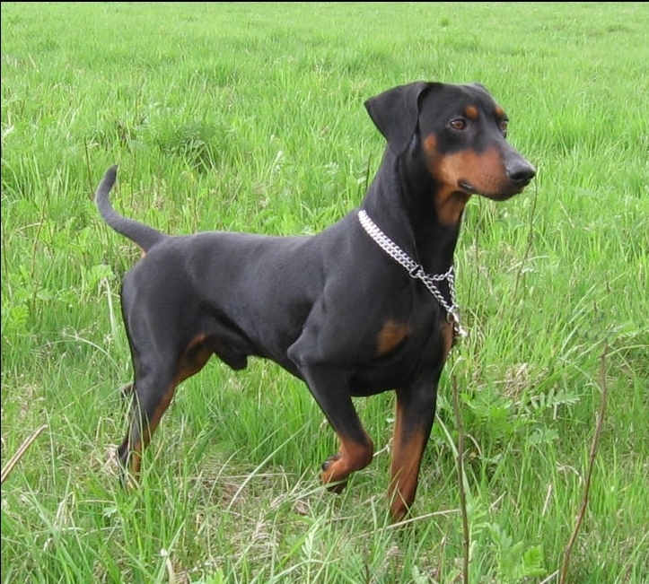 Pinczer średni YORK YUE WAN Igniculus (FCI) - Młodzieżowy Champion Polski, Champion Polski, Champion Czech, Champion Weteran Czech, Champion Weteran Słowacji